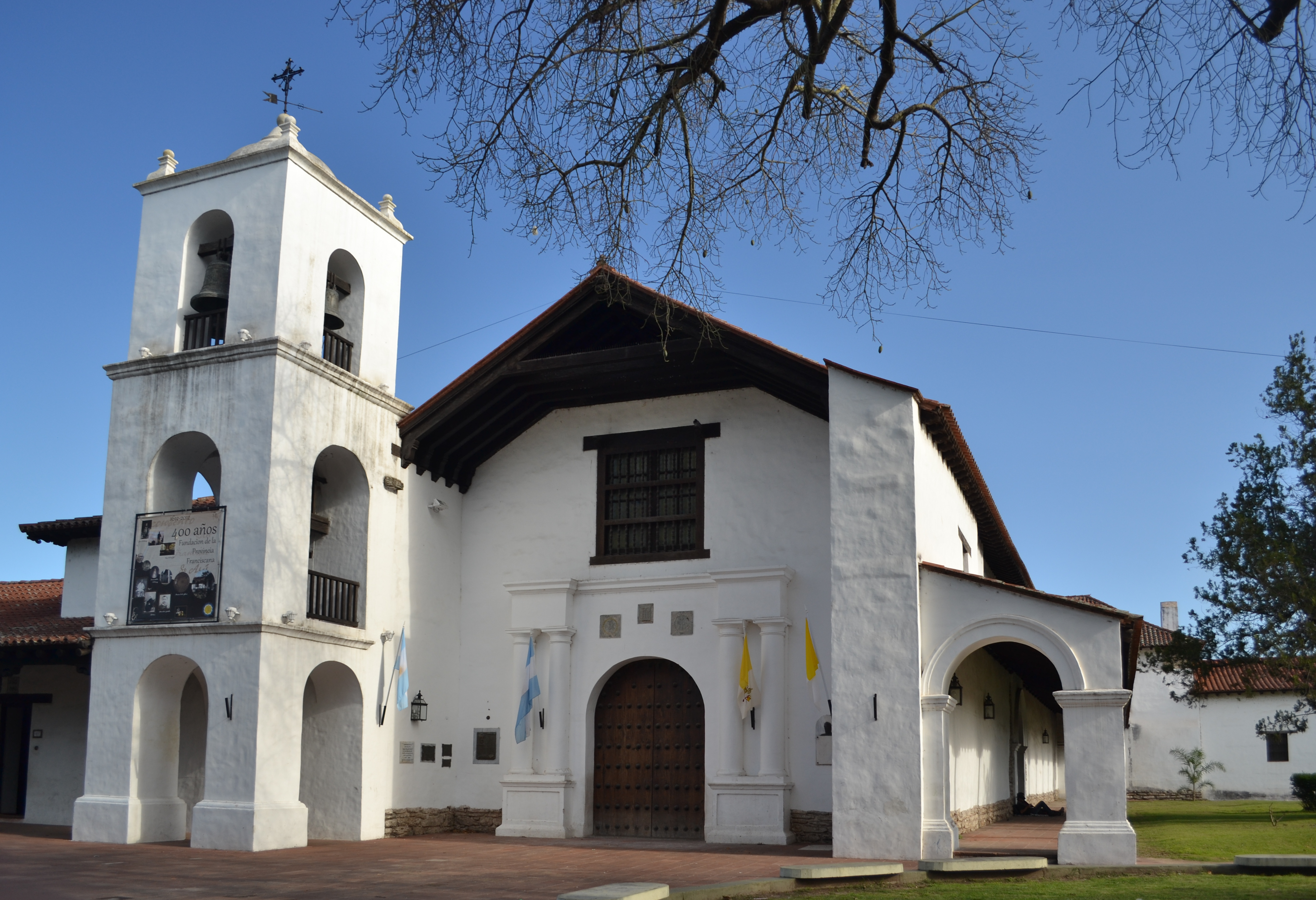 Templo y Convento de San Francisco